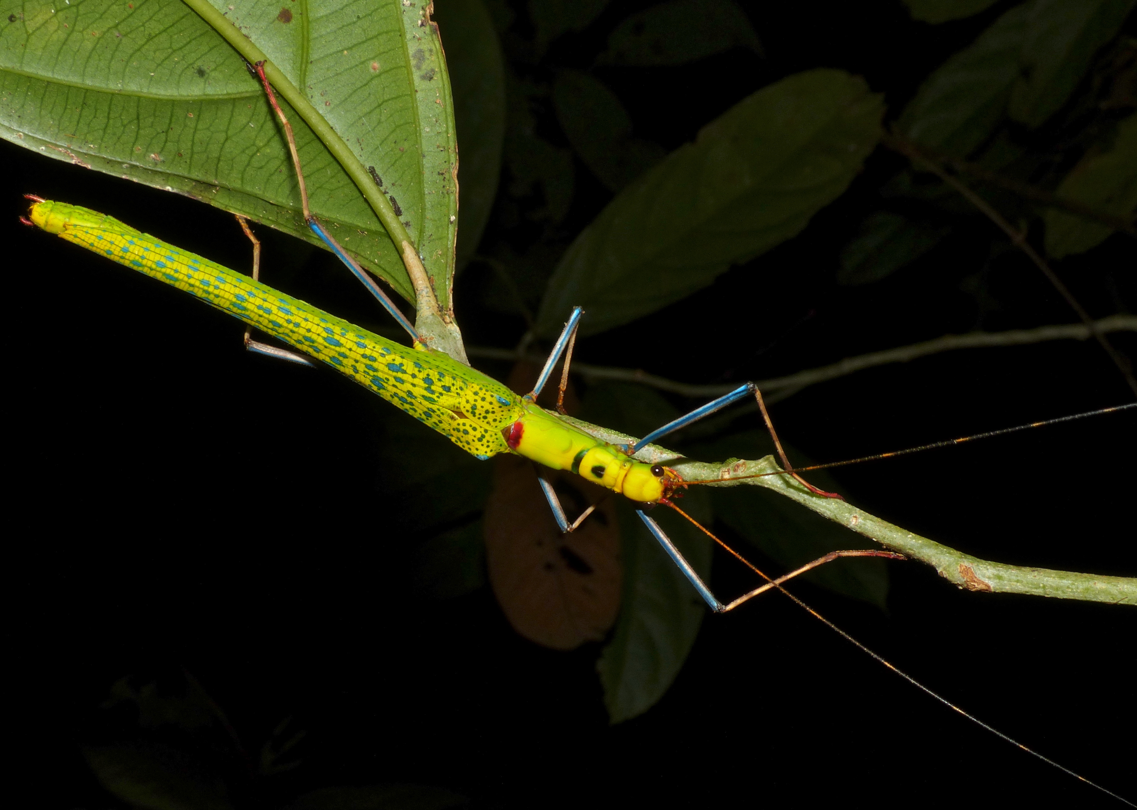 Night Walk Trail, Mulu NP, Sarawak, MALAYSIA